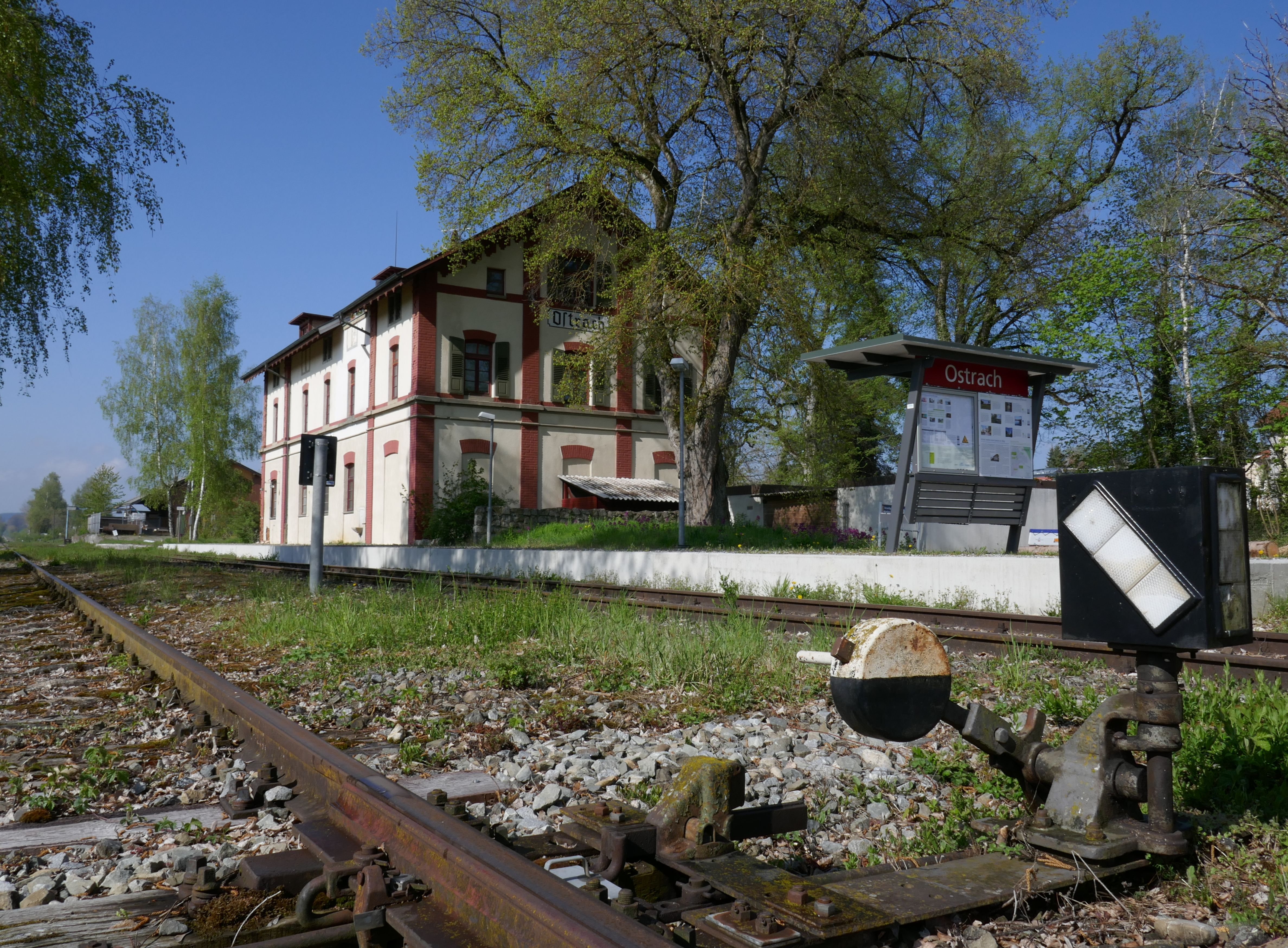 Bahnhof Ostrach und modernisierter Bahnsteig an der Bahnstrecke Altshausen - Pfullendorf